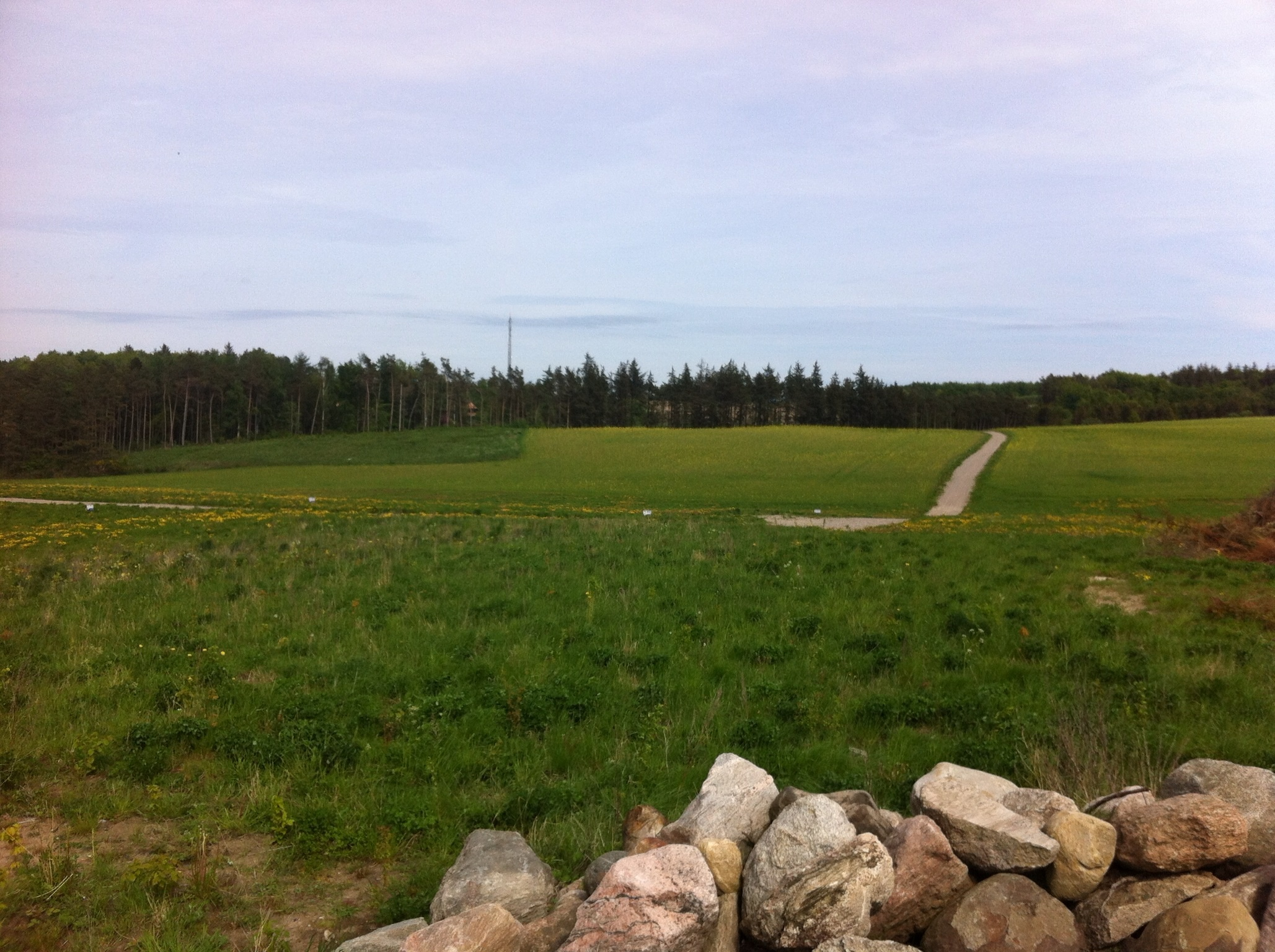 Den nye bydel Haderup Sund i Hadsund Syd er under opførelse.